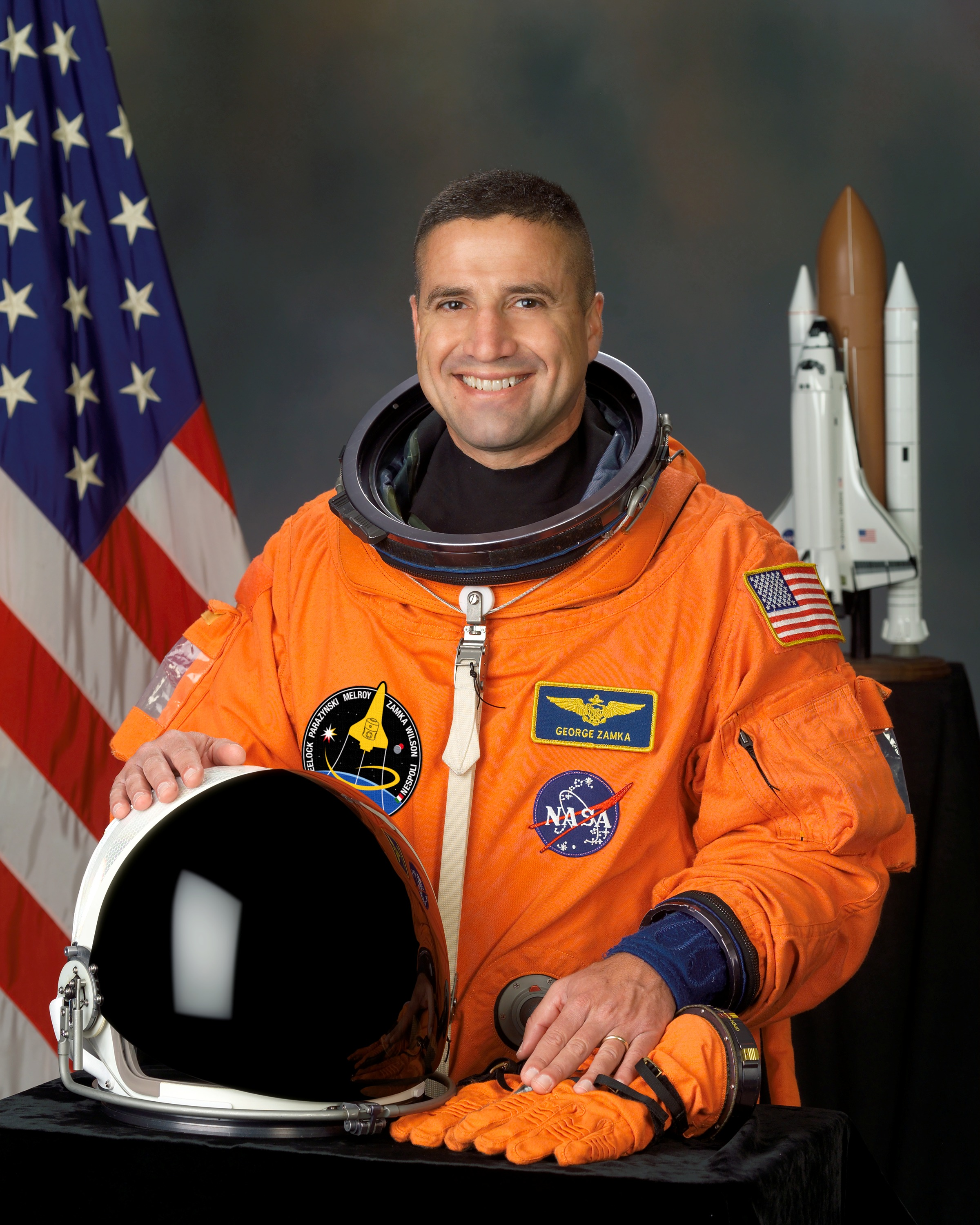 Colonel George D. Zamka, USMC, NASA astronaut